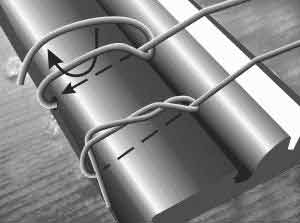 Knoten zur Befestigung von Saiten (am Gitarrensteg). Ursprung: Vektorgrafik; eigener Entwurf und Herstellung.